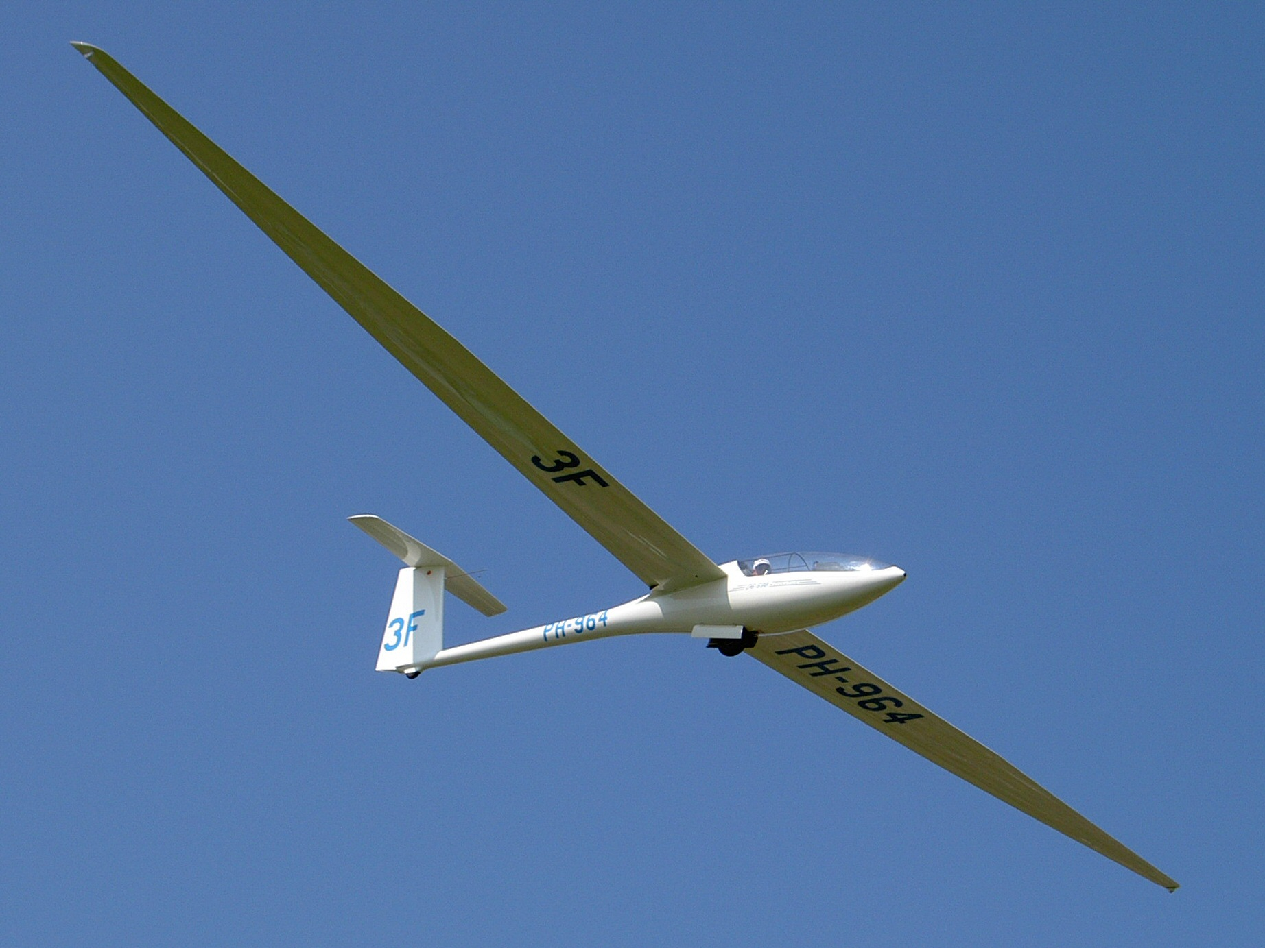 Glas-Dirks DG-600 18 PH-964 at Hoogeveen airfield.